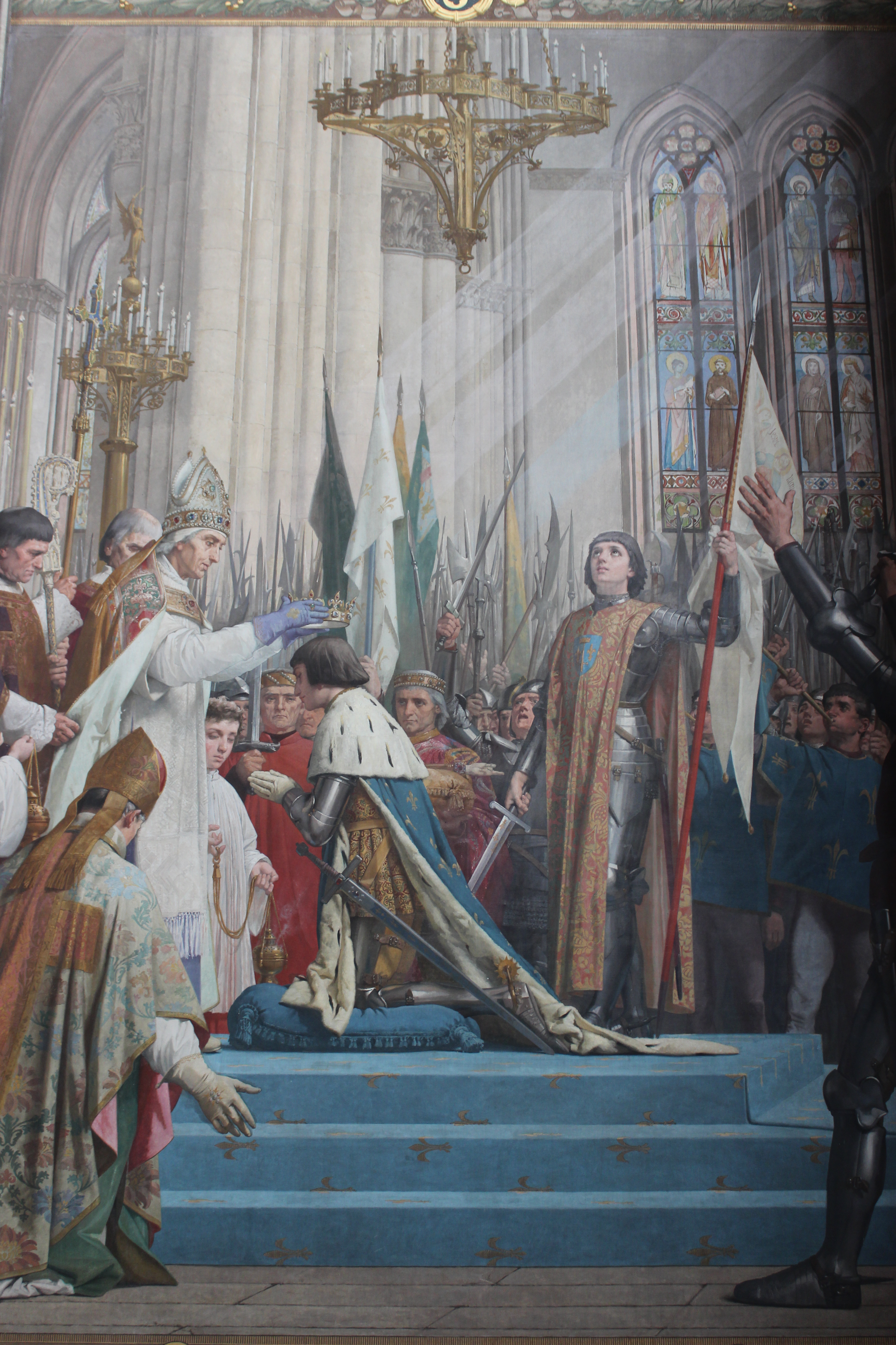 París, Panthéon. Coronación de Carlos VII.